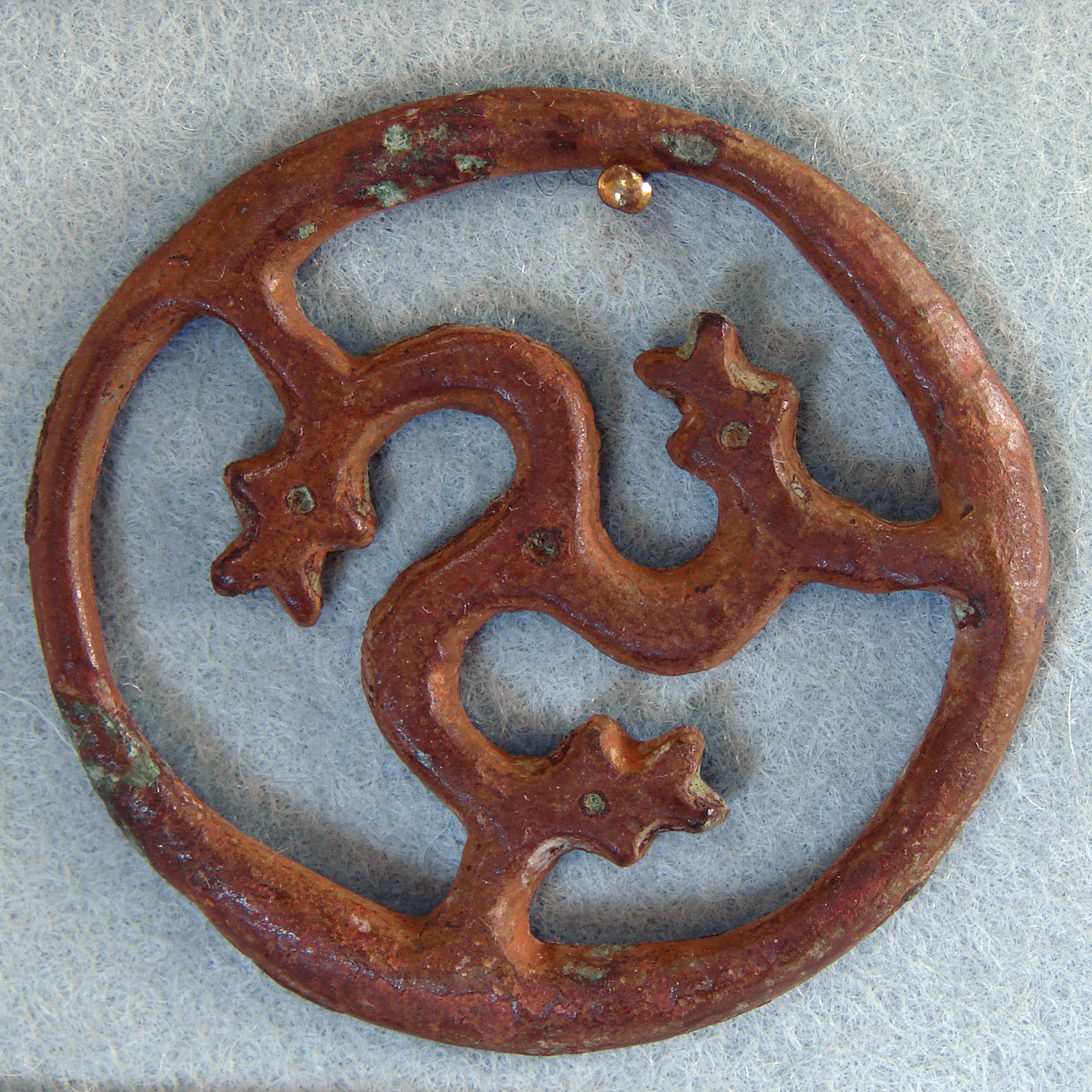 Rouelle ou plaque châtelaine, époque mérovingienne, bronze découpé; animaux formant un triscèle. Musée de Laon.